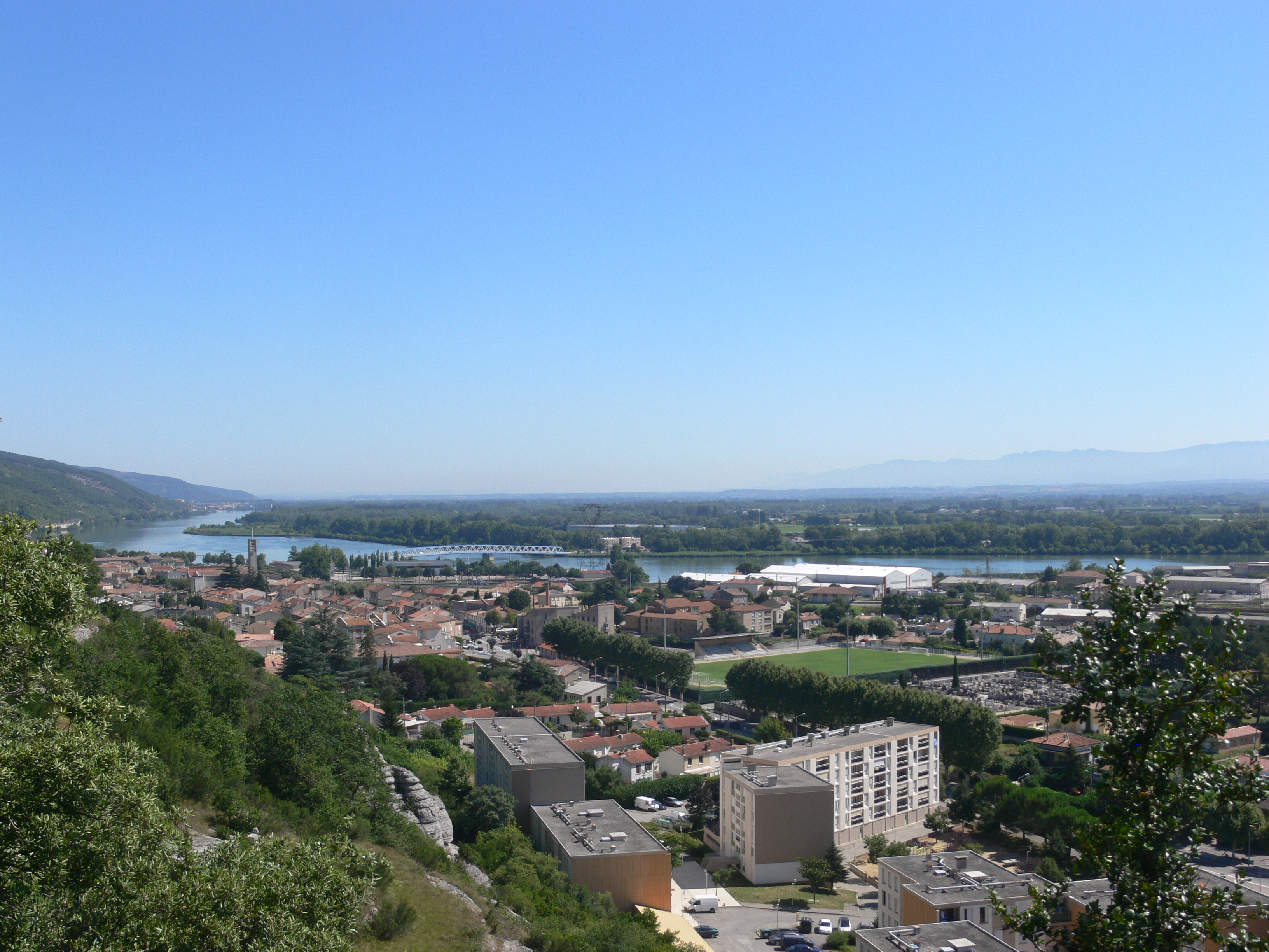 Le Pouzin